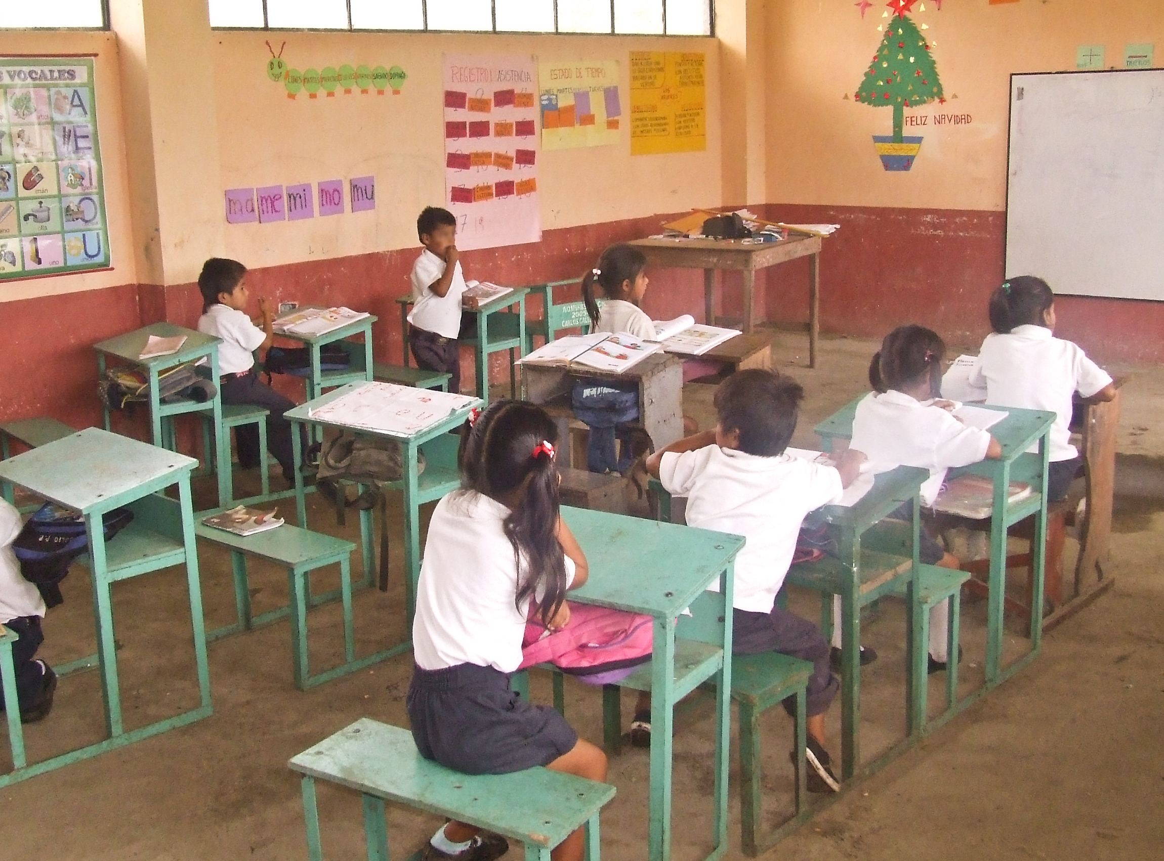 Shuar Grundschule in einer Communidad zwischen Puyo und Macas